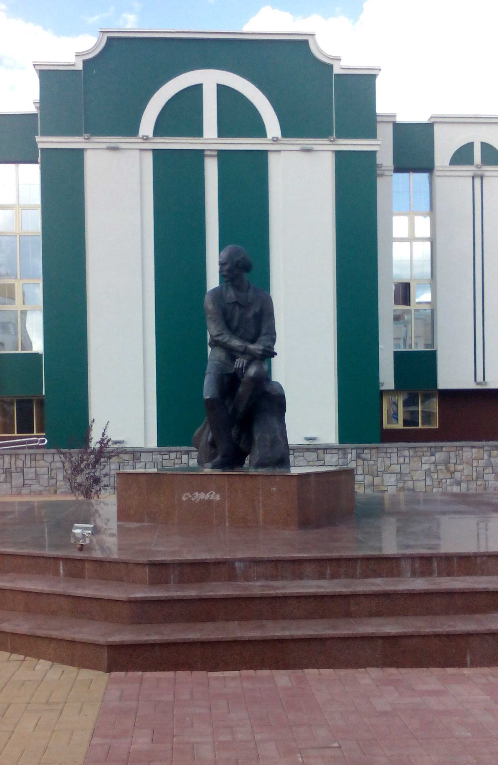 Памятник скульптору Степану Эрьзе (Нефёдову) возле Мордовского республиканского музея изобразительных искусств